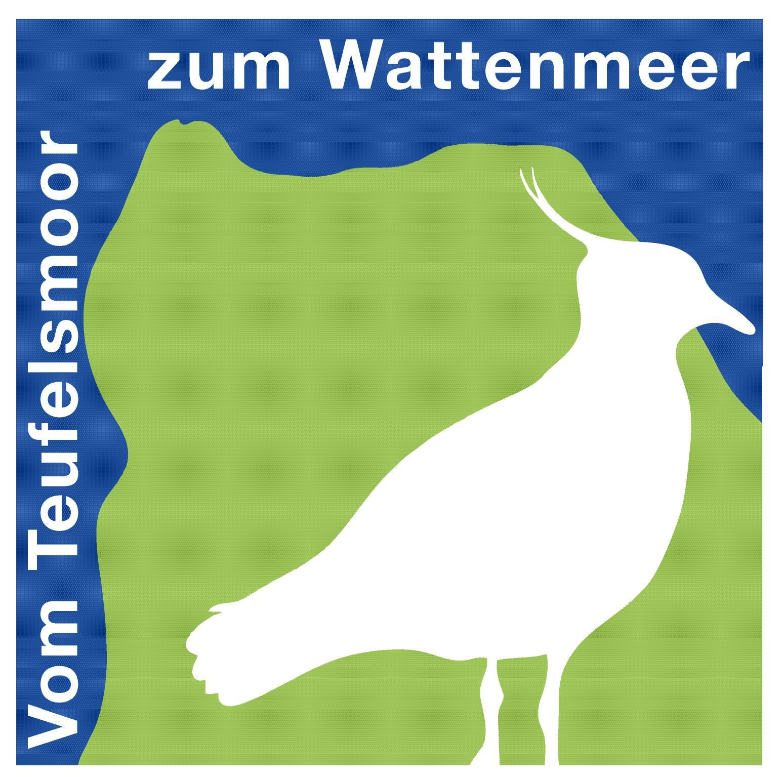 Logo des Radweges "Vom Teufelsmoor zum Wattenmeer"